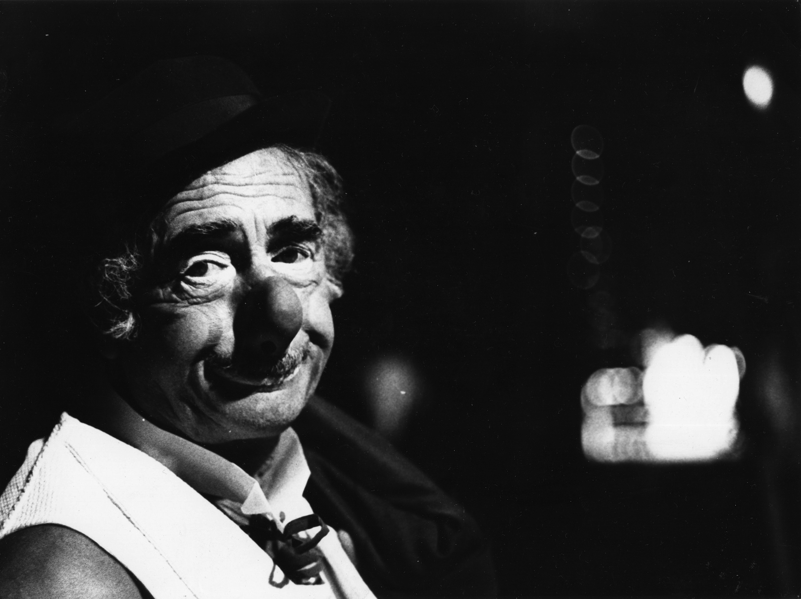 Le clown français Achille Zavatta en 1974.